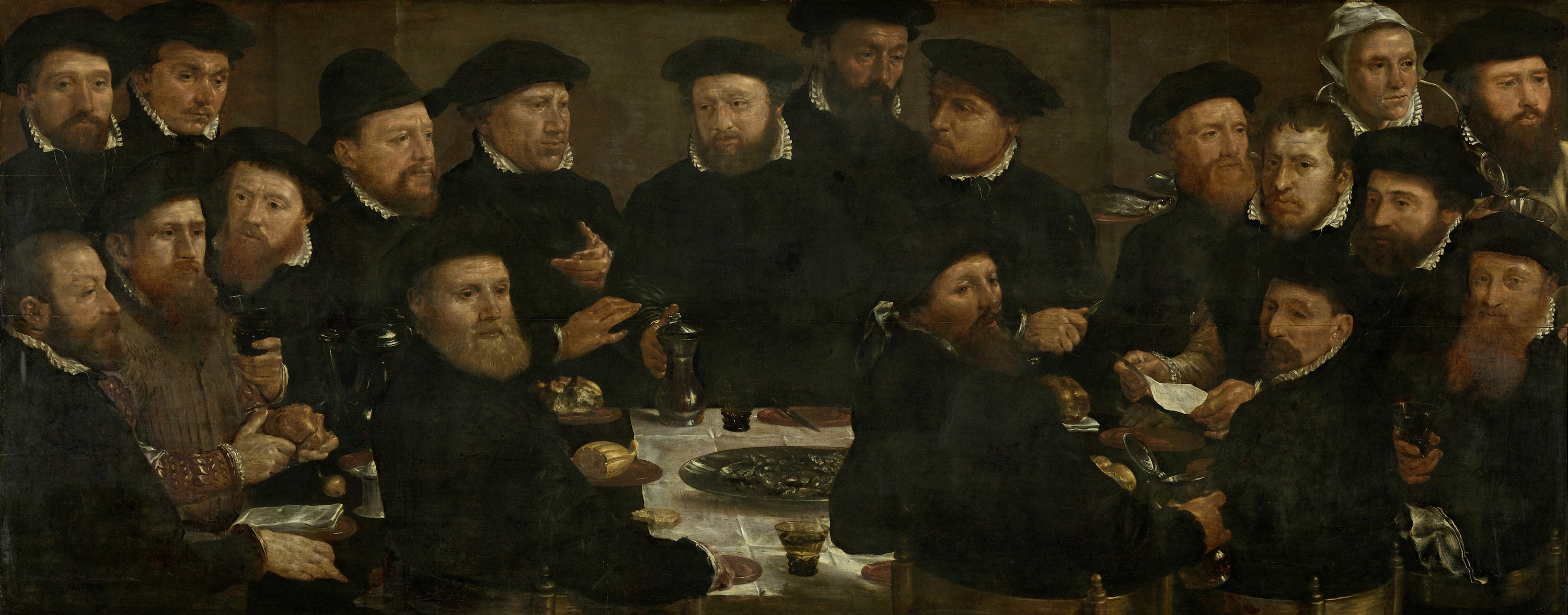 Schuttersstuk met de maaltijd van achttien Amsterdamse schutters van Rot L, 1566, bekend als 'De poseters'. De schutters van de Kloveniersdoelen eten vis met brood.